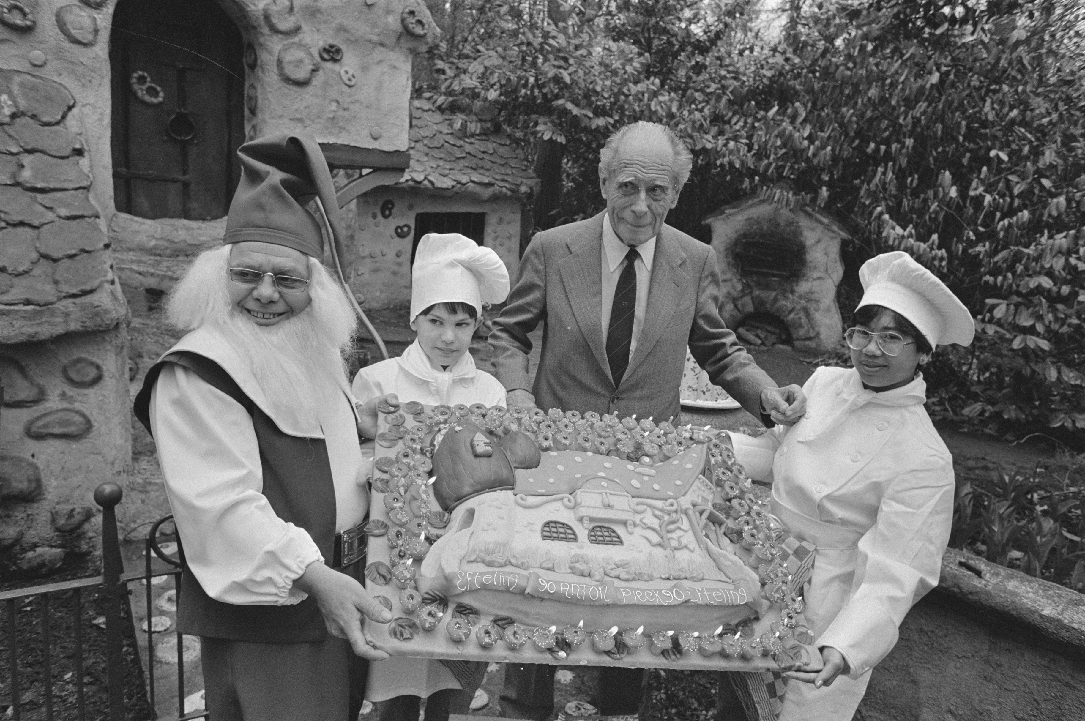 Collectie / Archief : Fotocollectie Anefo Reportage / Serie : [ onbekend ] Beschrijving : Anton Pieck 90 jaar; hij krijgt in de Efteling een grote taart aangeboden door een kabouter en twee kinderkoks Datum : 16 april 1985 Locatie : Kaatsheuvel, Noord-Brabant Trefwoorden : aanbiedingen, kabouters, taarten, tekenaars Persoonsnaam : Pieck, Anton Fotograaf : Bogaerts, Rob / Anefo Auteursrechthebbende : Nationaal Archief Materiaalsoort : Negatief (zwart/wit) Nummer archiefinventaris : bekijk toegang 2.24.01.05 Bestanddeelnummer : 933-2949